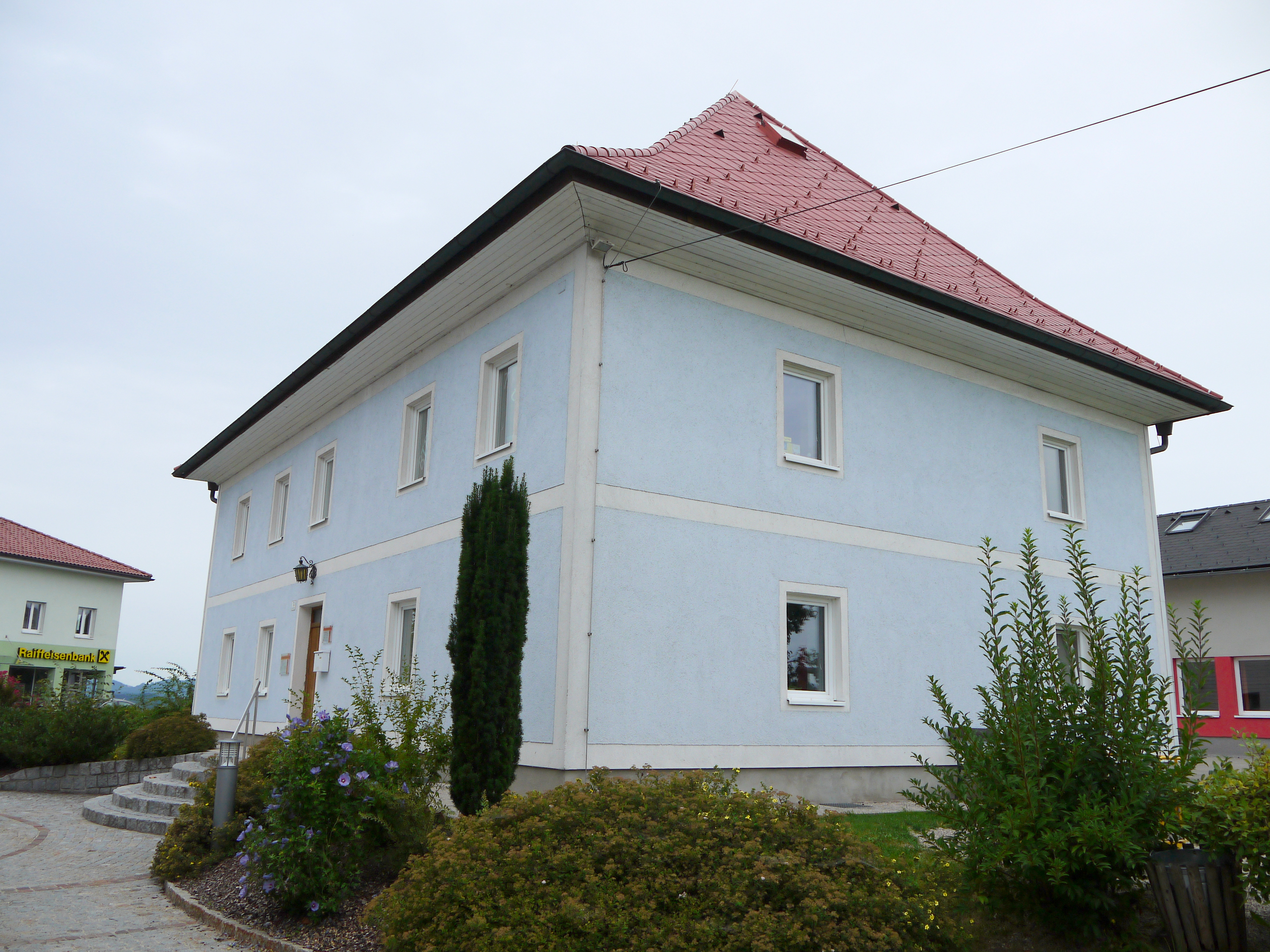 Pfarrhof